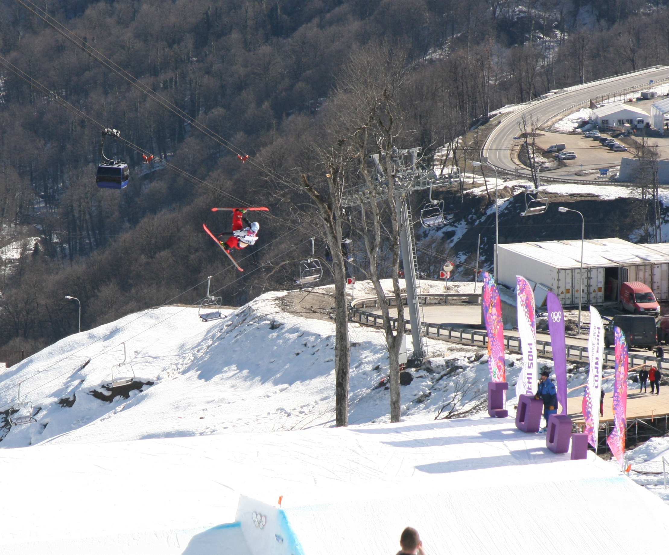 Соревнования по слоупстайлу на зимних Олимпийских играх 2014 в Сочи